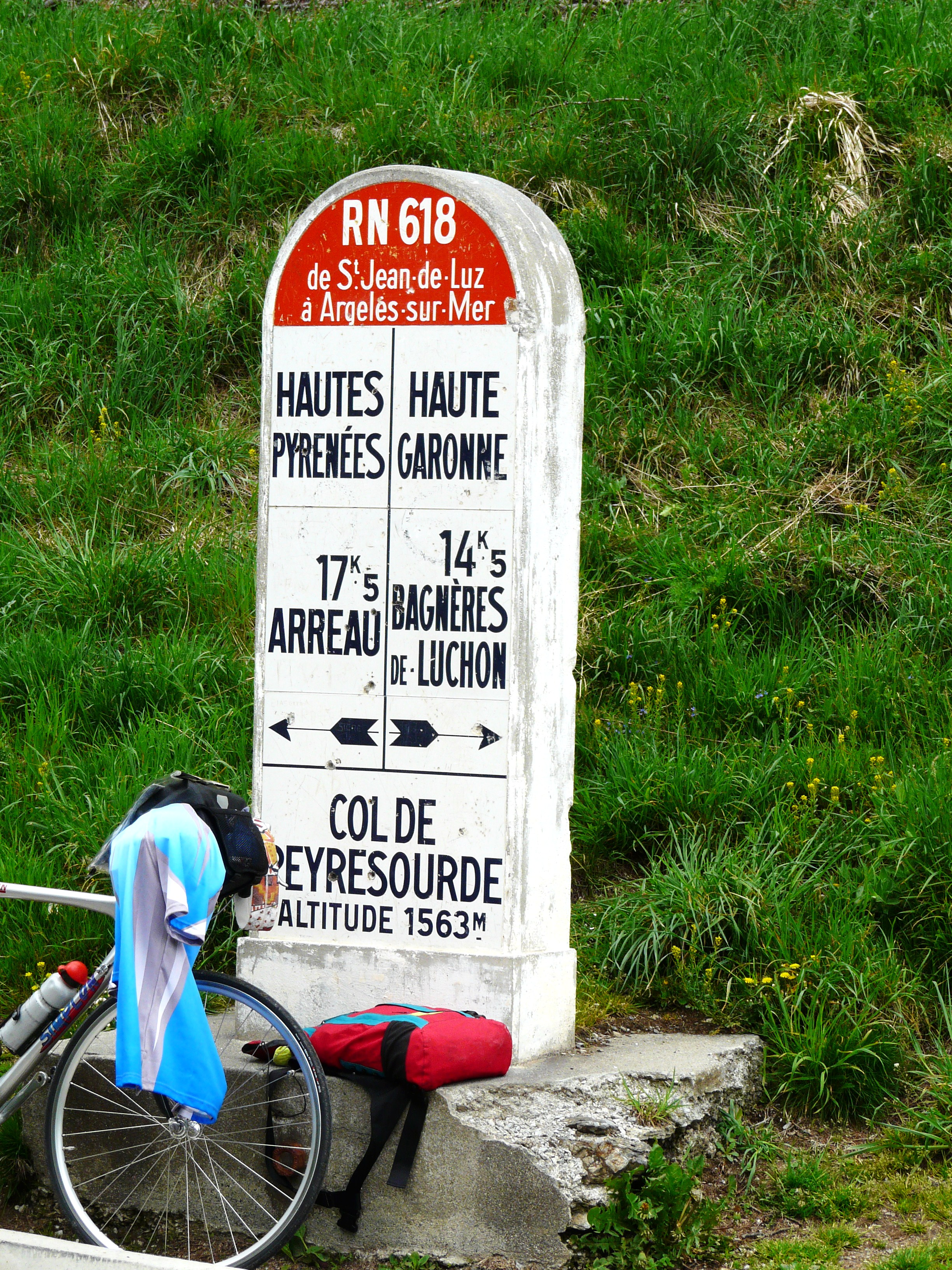 La borne de l'ancienne route nationale 618 (devenue route départementale 618) marquant le sommet du col de Peyresourde.